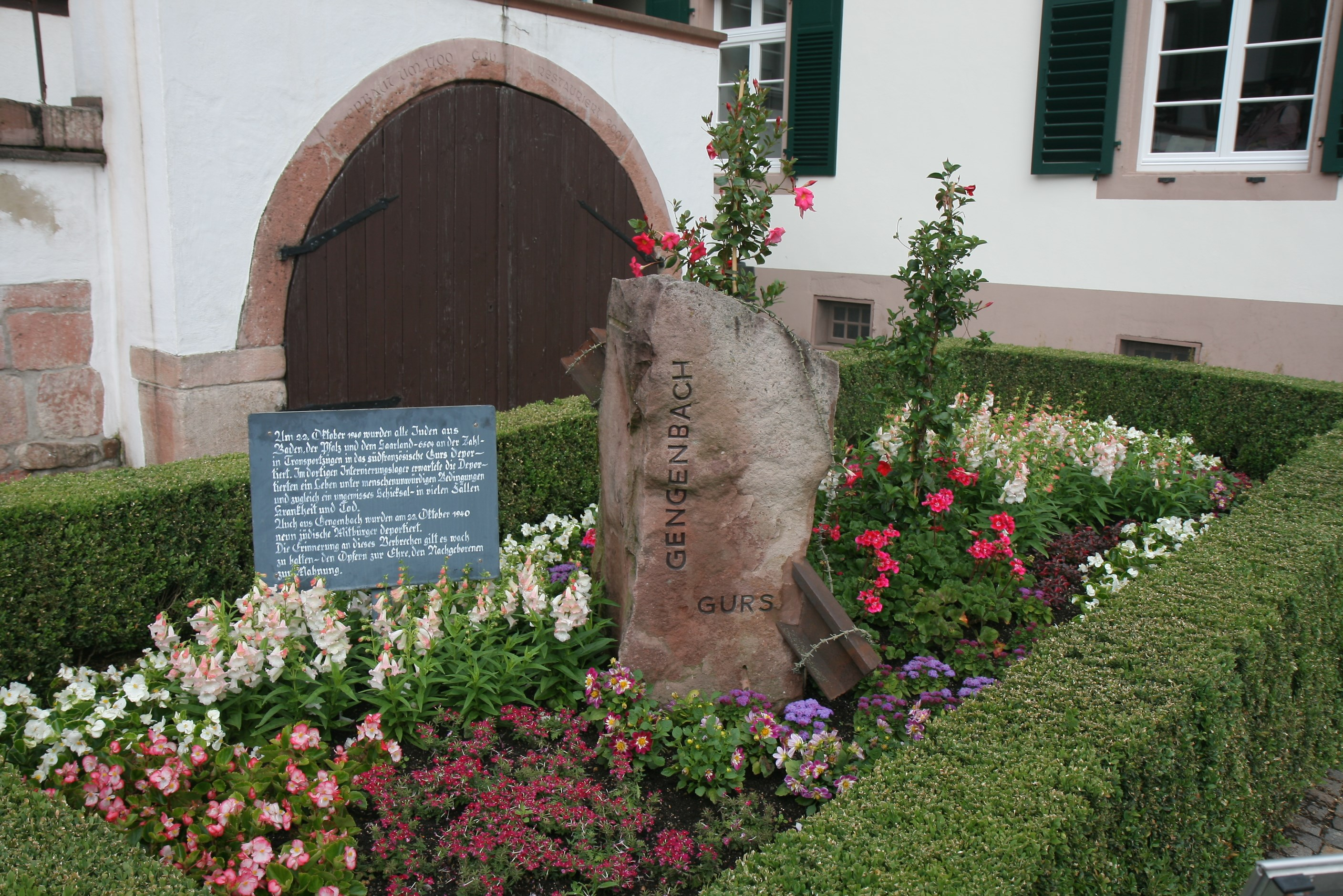 Gengenbach, Gedenkstätte zur Erinnerung an die Deportation Gengenbacher Juden nach Gurs am 22. Oktober 1940.